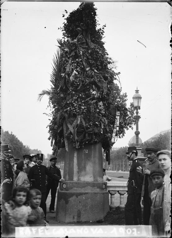 Estatua de Rafael Casanova en el Salón de San Juan, año 1907